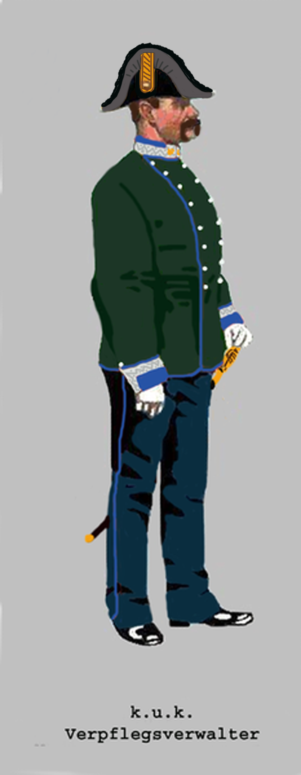 k.u.k. Verpflegsverwalter in Parade (Egalisierung Silber/Lichtblau) - Nach einem Gemälde im Heeresgeschichtlichen Museum in Wien. Details und Farben sind der k.u.k. Adjustierungsvorschrift (Ausgabe 1912) entnommen.